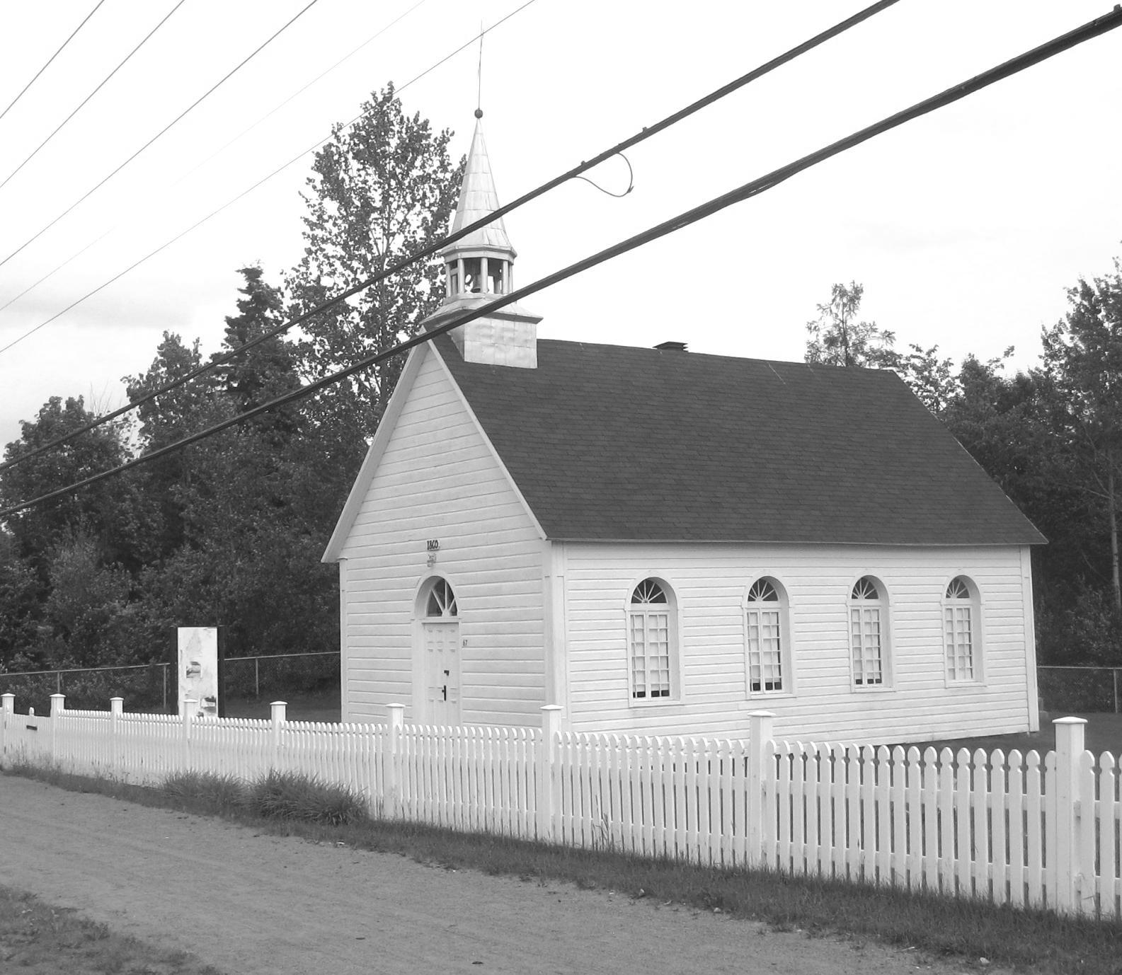 Eglise Campbell Hall à Stoneham Qc Canada